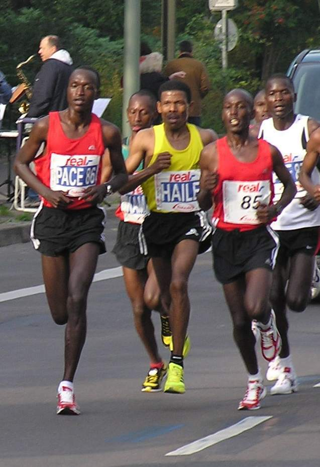 Haile Gebrselassie und Wilson Kigen (# 85) beim Berlin-Marathon 2008